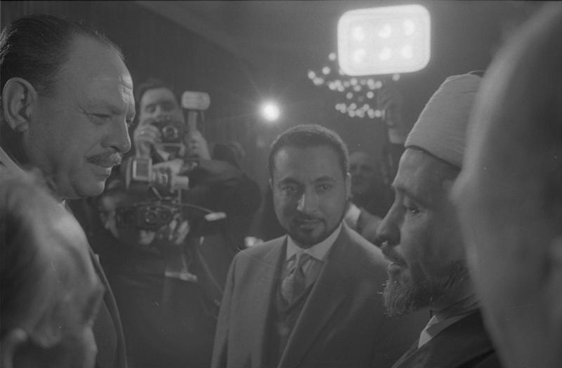 Pakistanischer Staatspräsident Ayoub Khan zu Besuch in Deutschland Besuch von Vertretern der "Iami 'at Al Islam" im Hotel "Vier Jahreszeiten" (München)